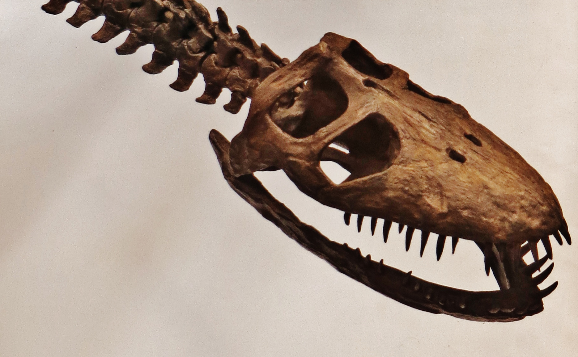 Fossil of Plesiopterys- Took the picture at Museum am Lowentor, Stuttgart